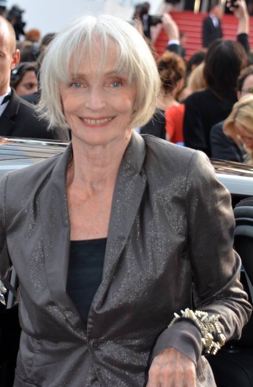 Edith Scob au festival de Cannes